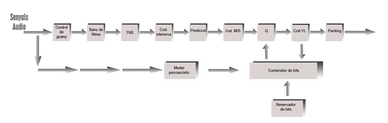 EsquemaMPEG-2ACC